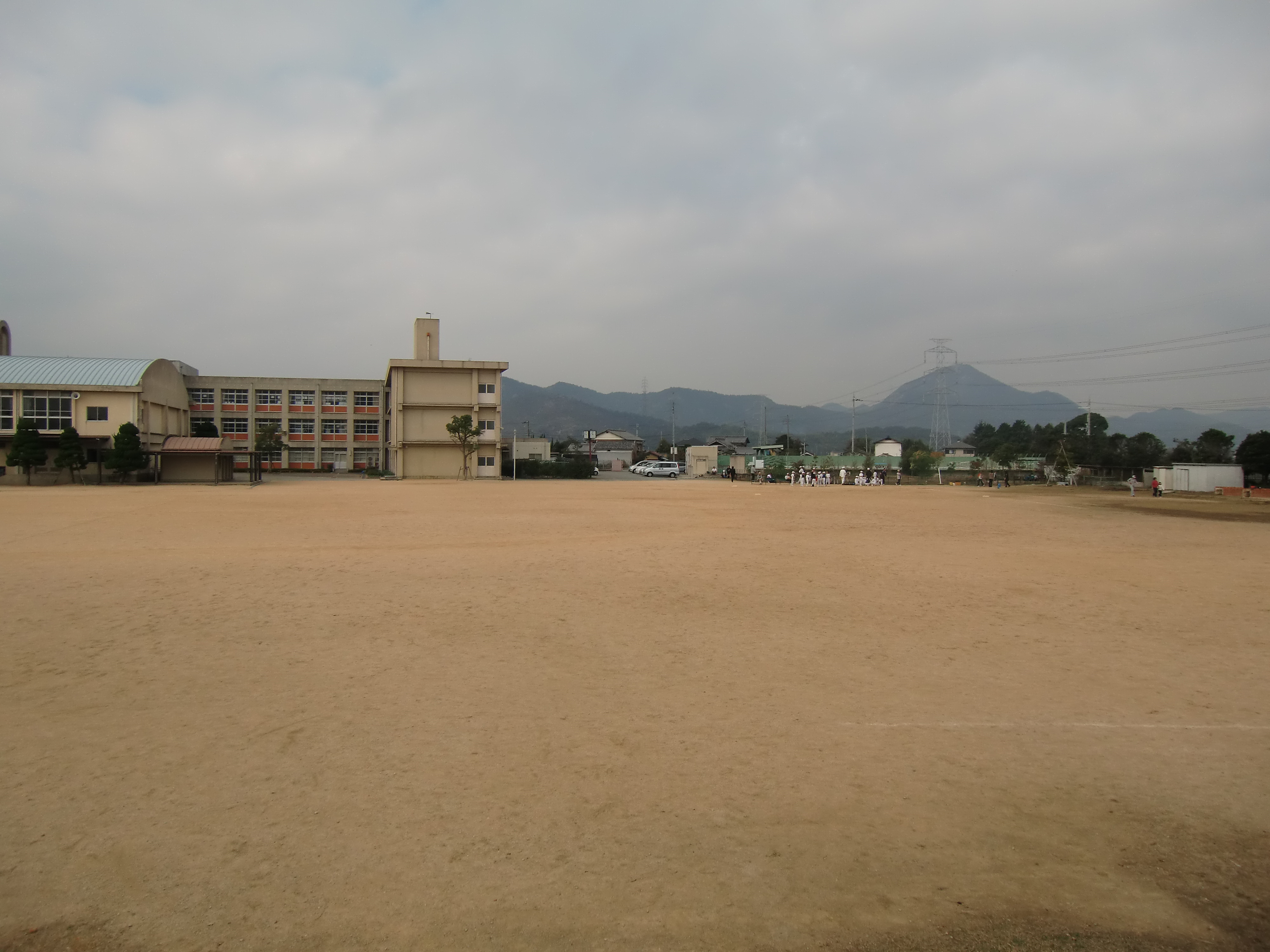 加古川市立西神吉小学校グラウンド